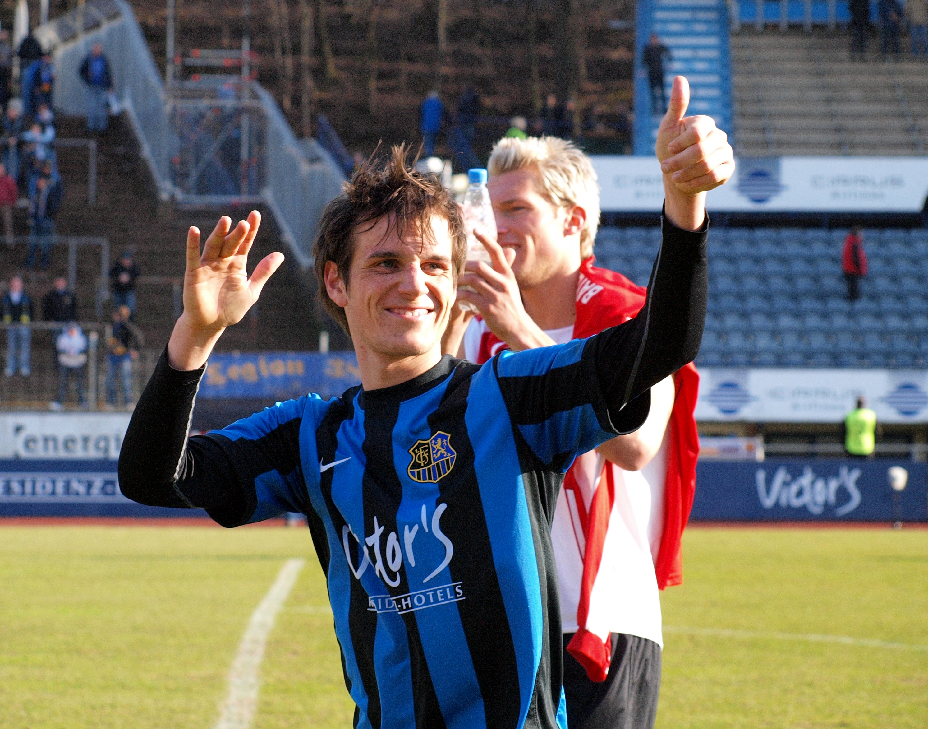 Manuel Stiefler freut sich über einen Sieg und ein gutes Spiel